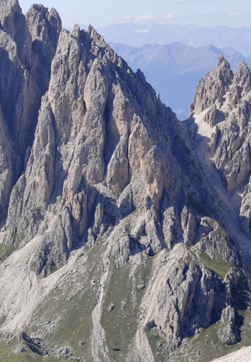 Sas de Mesdì vom Col dala Pieres